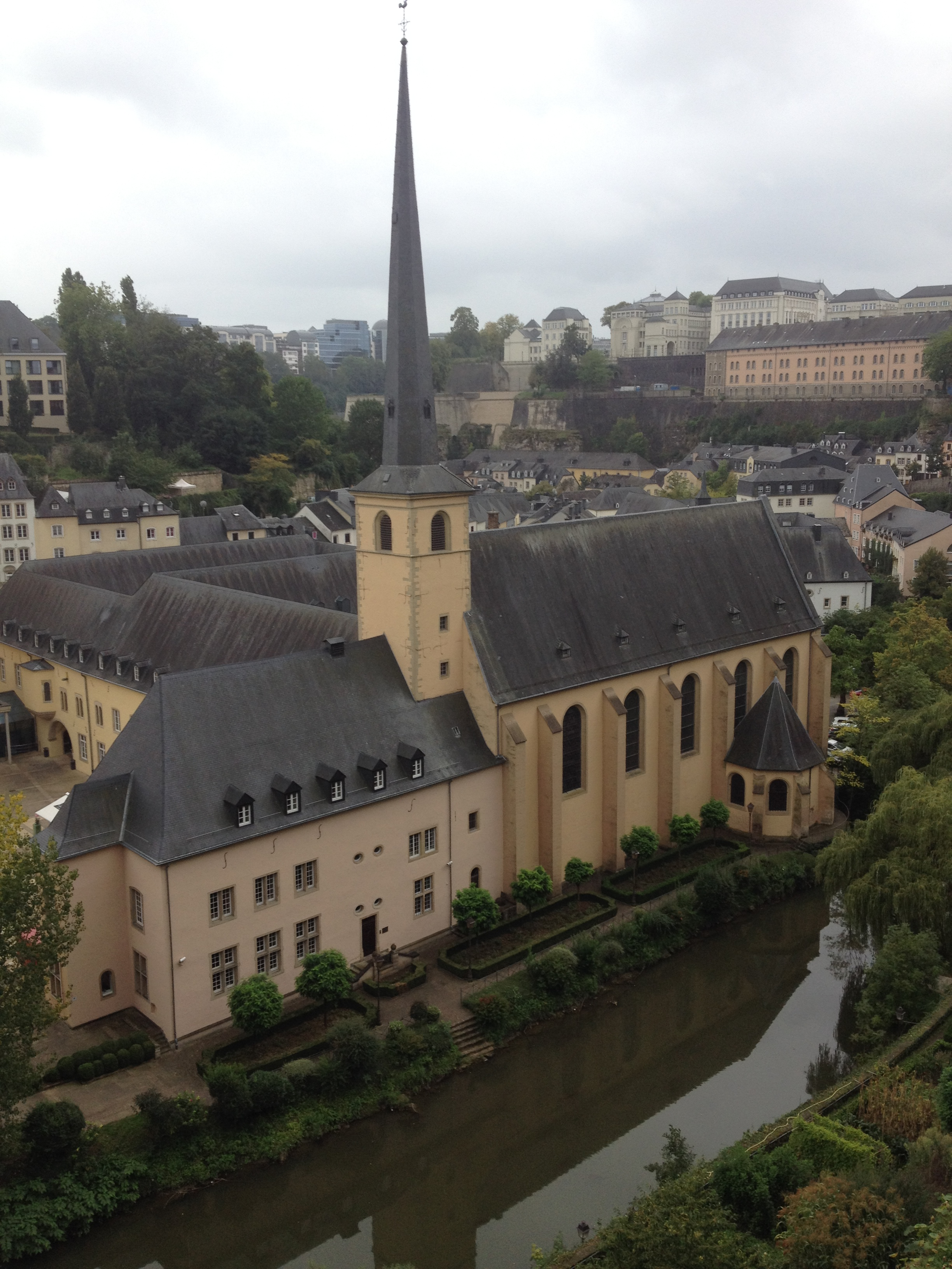 Abbaye de Neumünster depuis les casemates du bloc